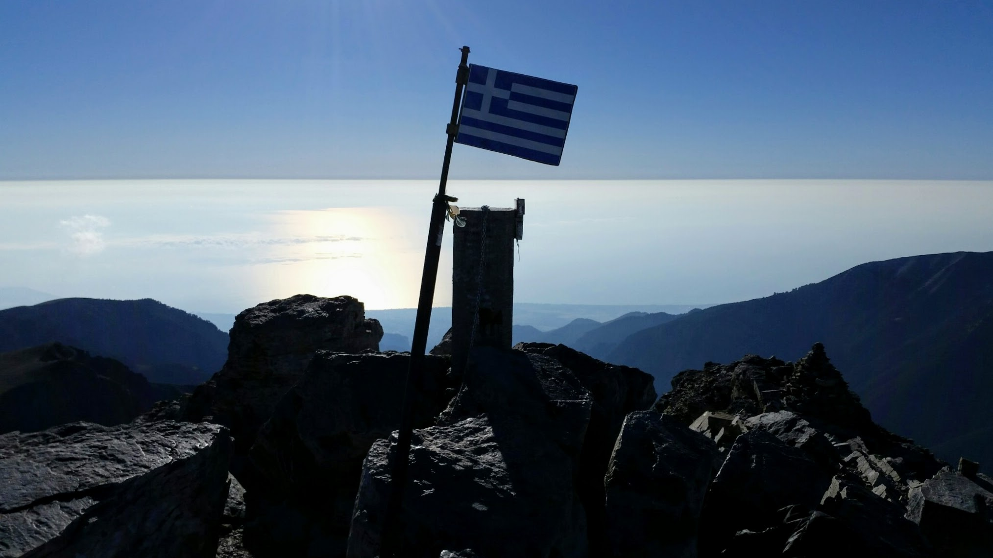 Varahommikune vaade Olümpose tipust Egeuse merele